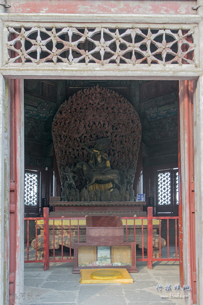 中文（中国大陆）: 亭内供奉的“吉祥天母”，又叫骡子天王